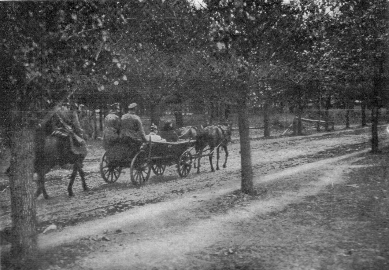 German officer taken prisoner in Osowiec fortress. Пленный германский офицер в крепости Осовец.